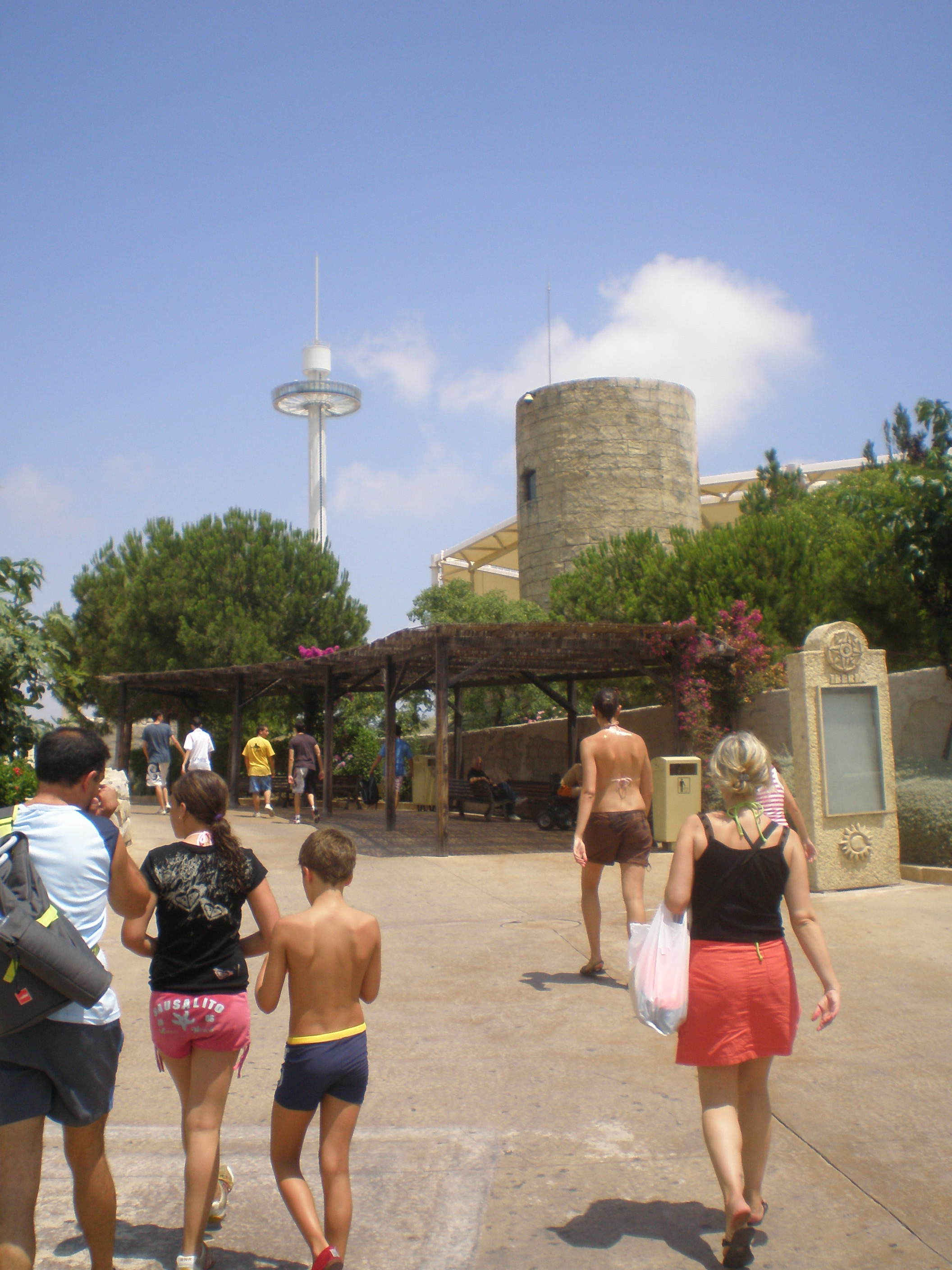 La torre d'observació Infinnito.